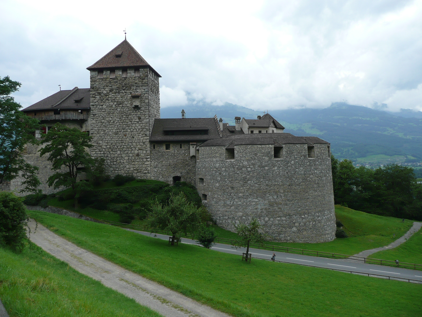 Schloss Vaduz, Liechtenstein